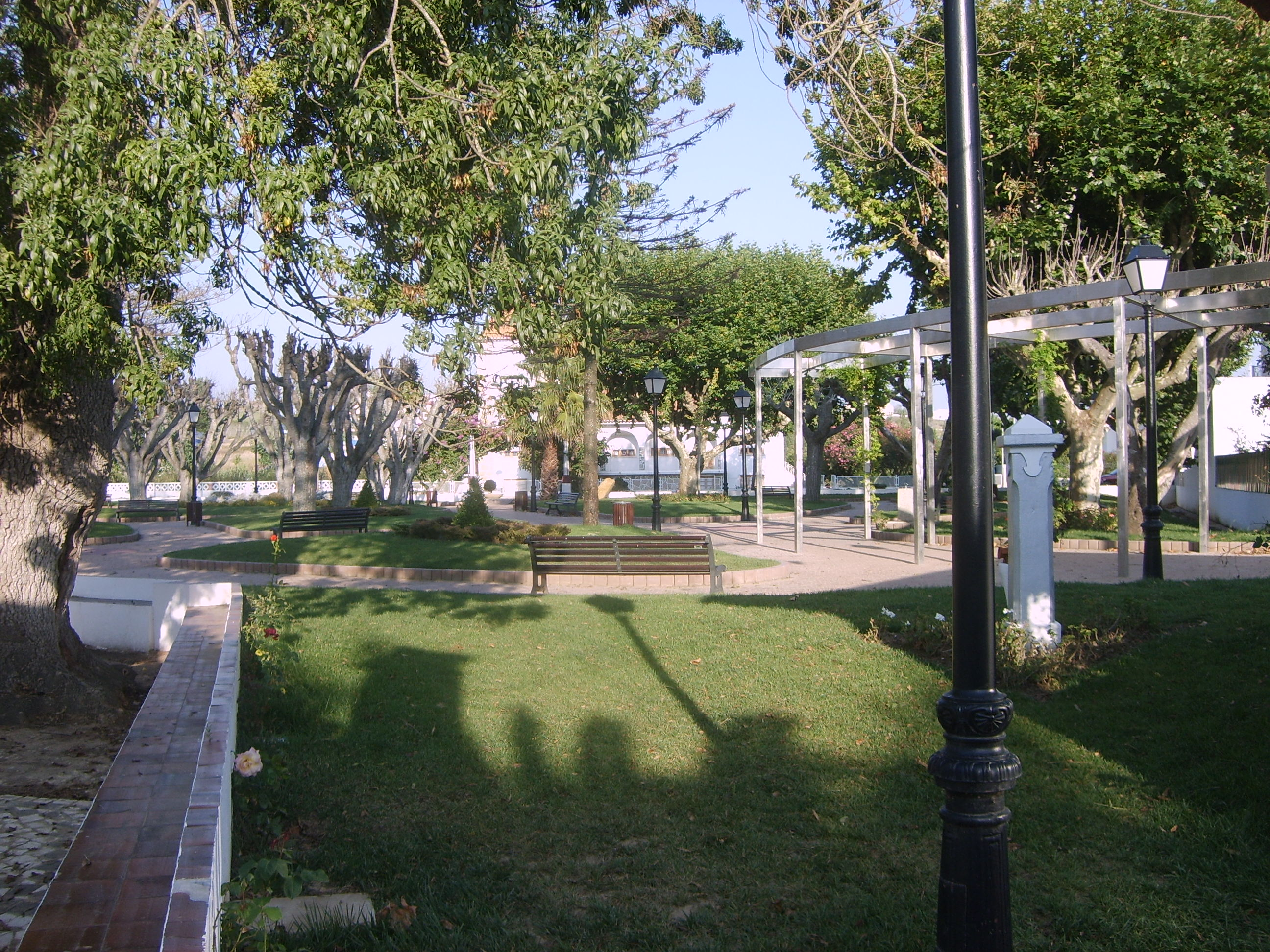 Lourinhã